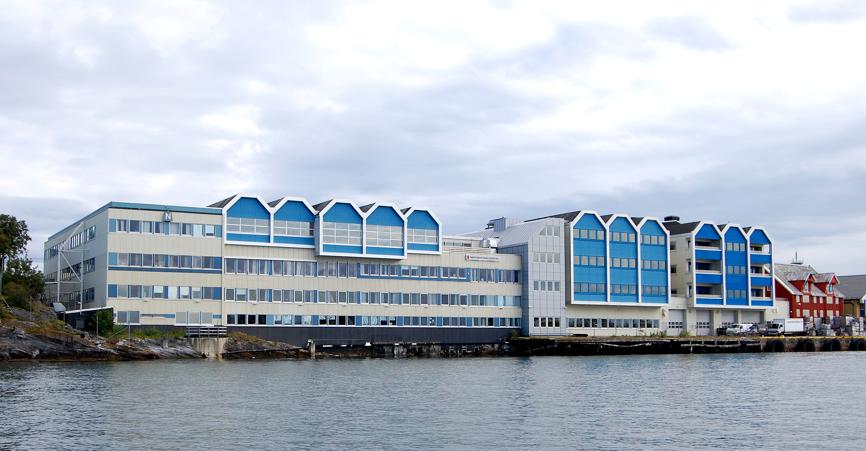 Brønnøysundregistrene sett fra sjøsiden.